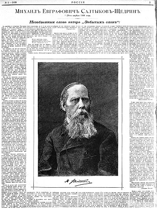 Premier numéro du journal Rossia Lien vers une version de meilleure qualité